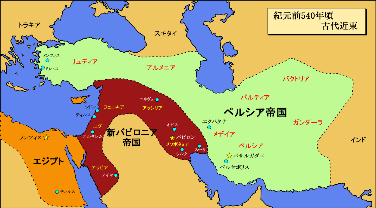 紀元前540年頃の近東図